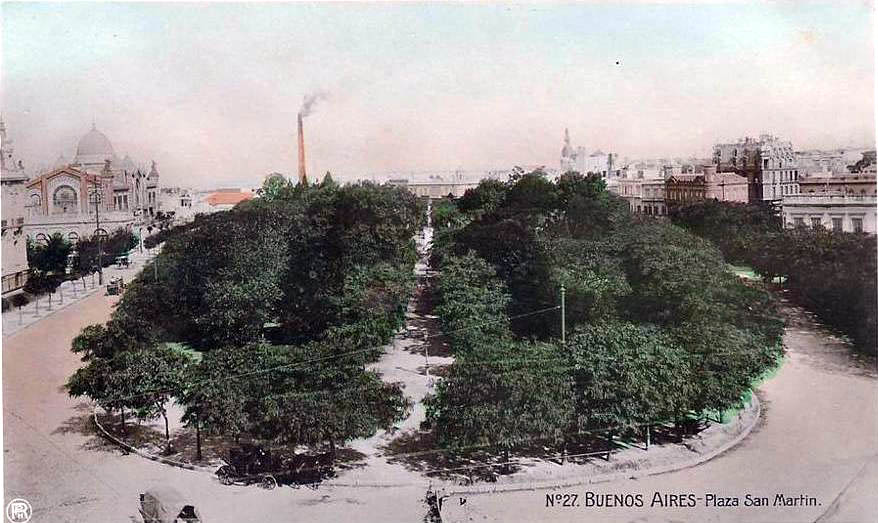 Vista aérea de la Plaza San Martín, probablemente tomada desde la Casa Pereyra Iraola. Al costado izquierdo asoma el nuevo Palacio Ortiz Basualdo, seguido por el Pabellón Argentino (Museo de Bellas Artes) demolido en 1932. Todavía no existía el Plaza Hotel (1909), y estaba abierta la calle Arenales.